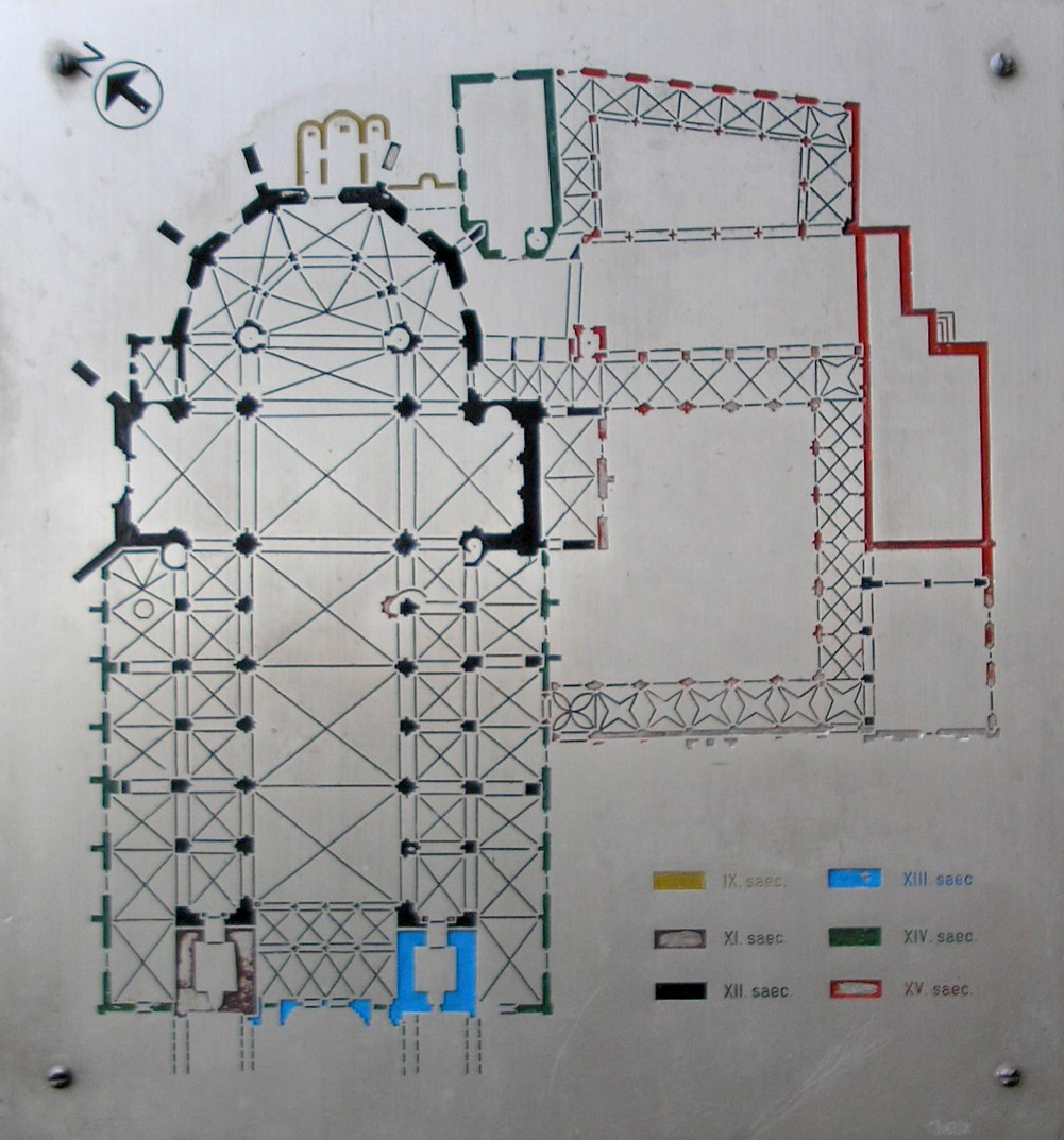 Plan of Basel Münster with Kreuzgang).